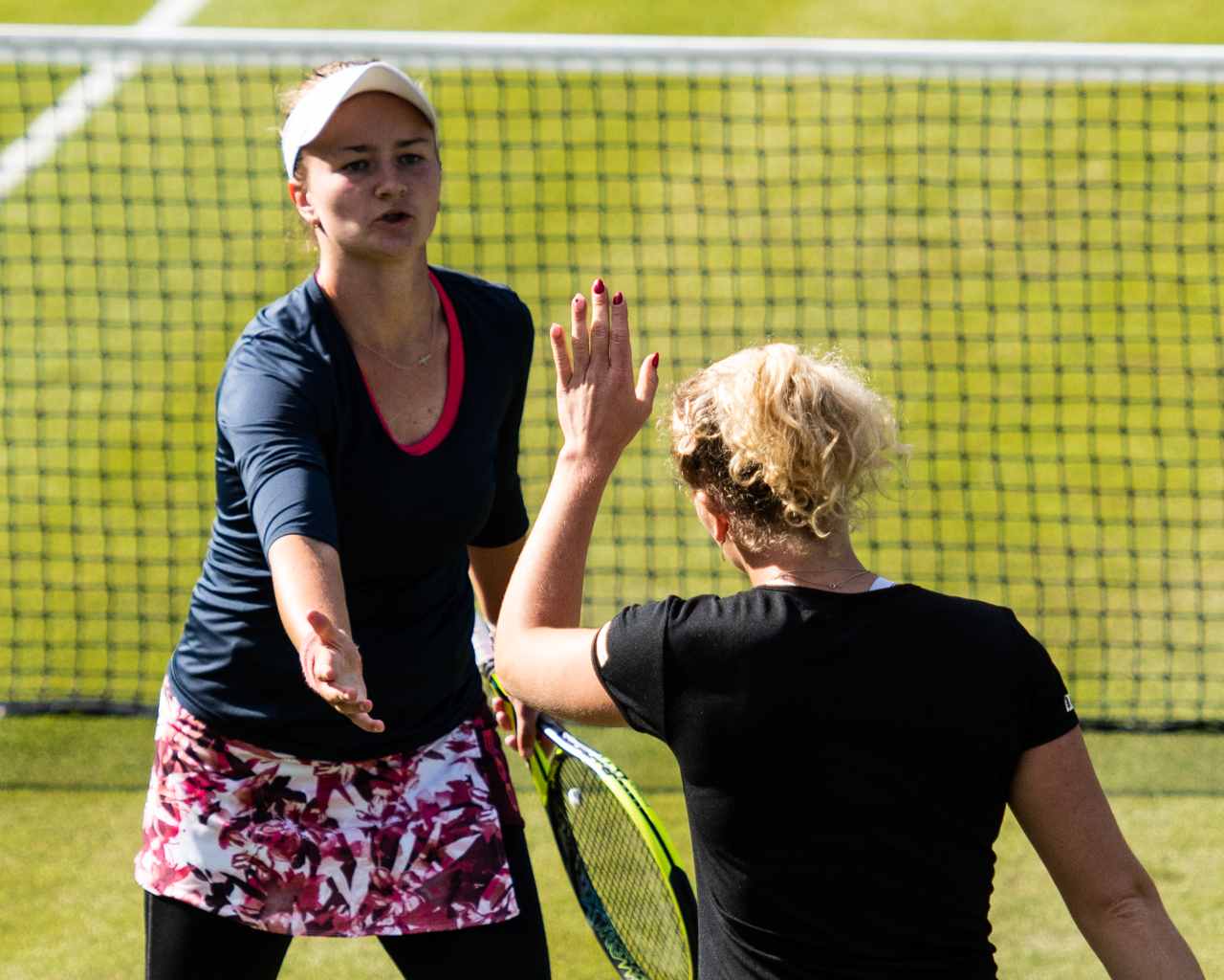 Katerina Siniakova & Barbora Krejcikova